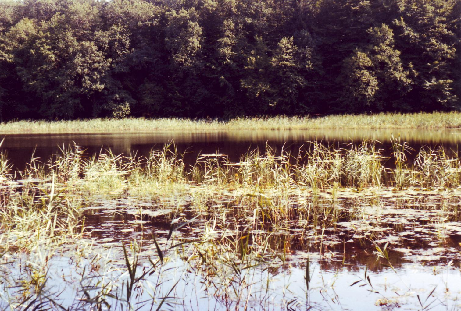 Etangs de Bonfol dans le canton du Jura en Suisse; origine: photographie personnelle